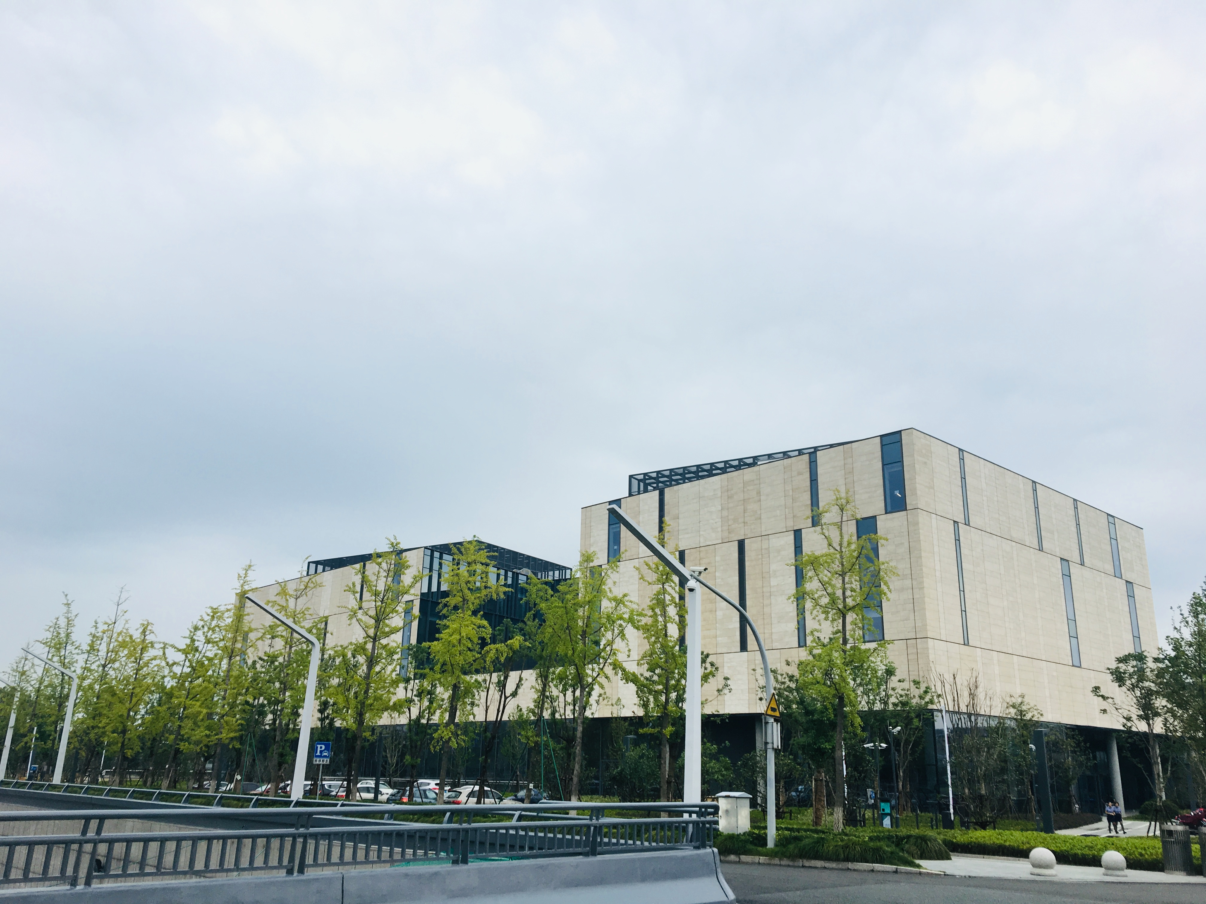 中文（中国大陆）: 宁波图书馆新馆（东部新城）